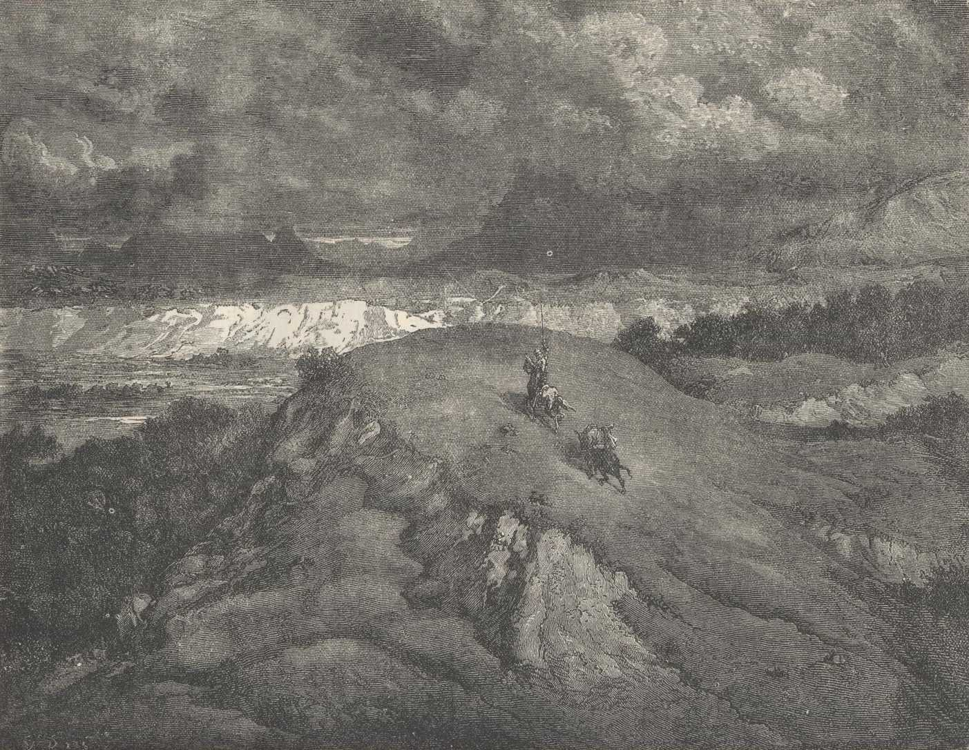 Dom Quixote e Sancho Pança na Sierra Morena